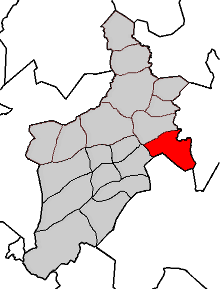 Situación da parroquia de Cullergondo no concello de Abegondo